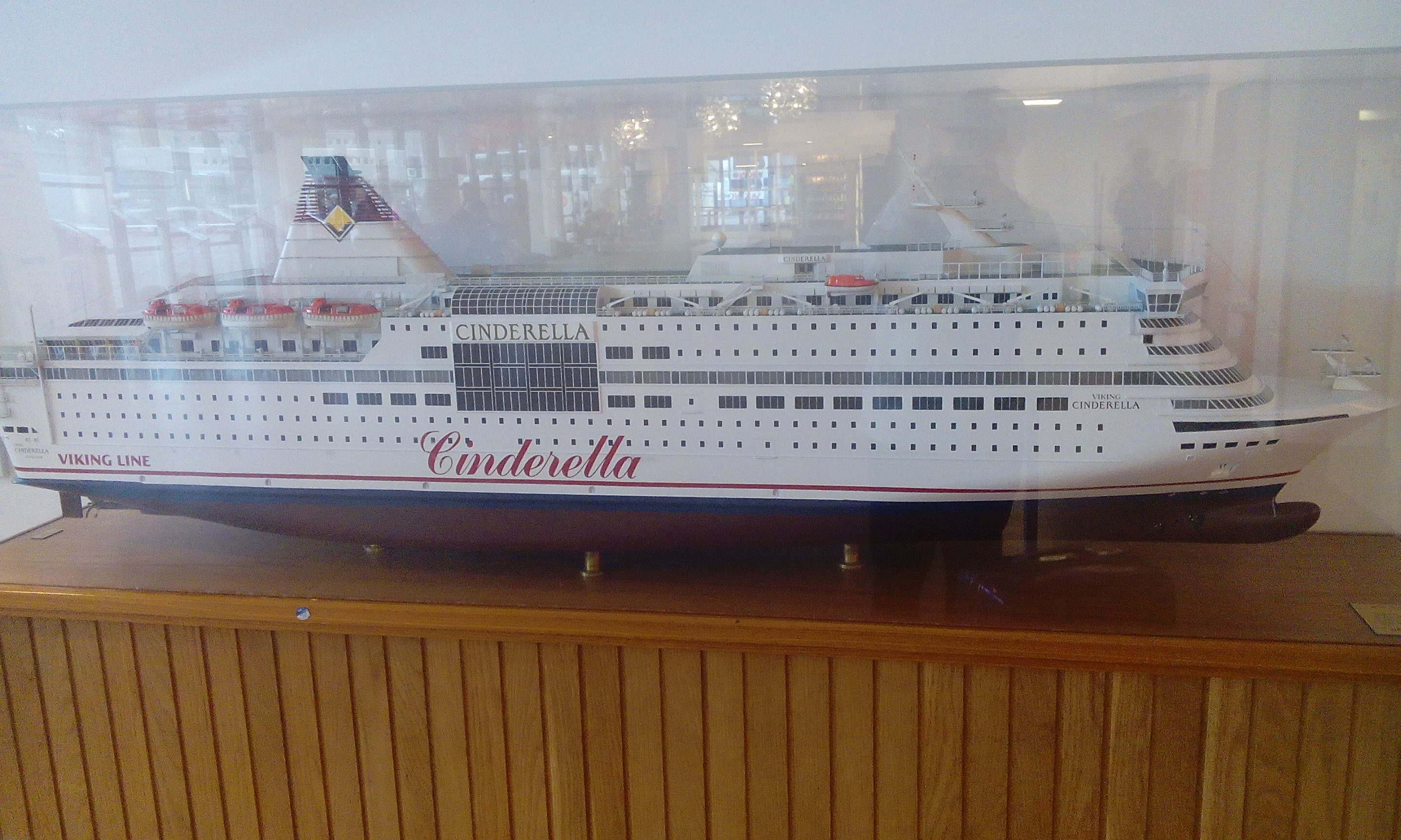 MS Cinderella Pienoismalli